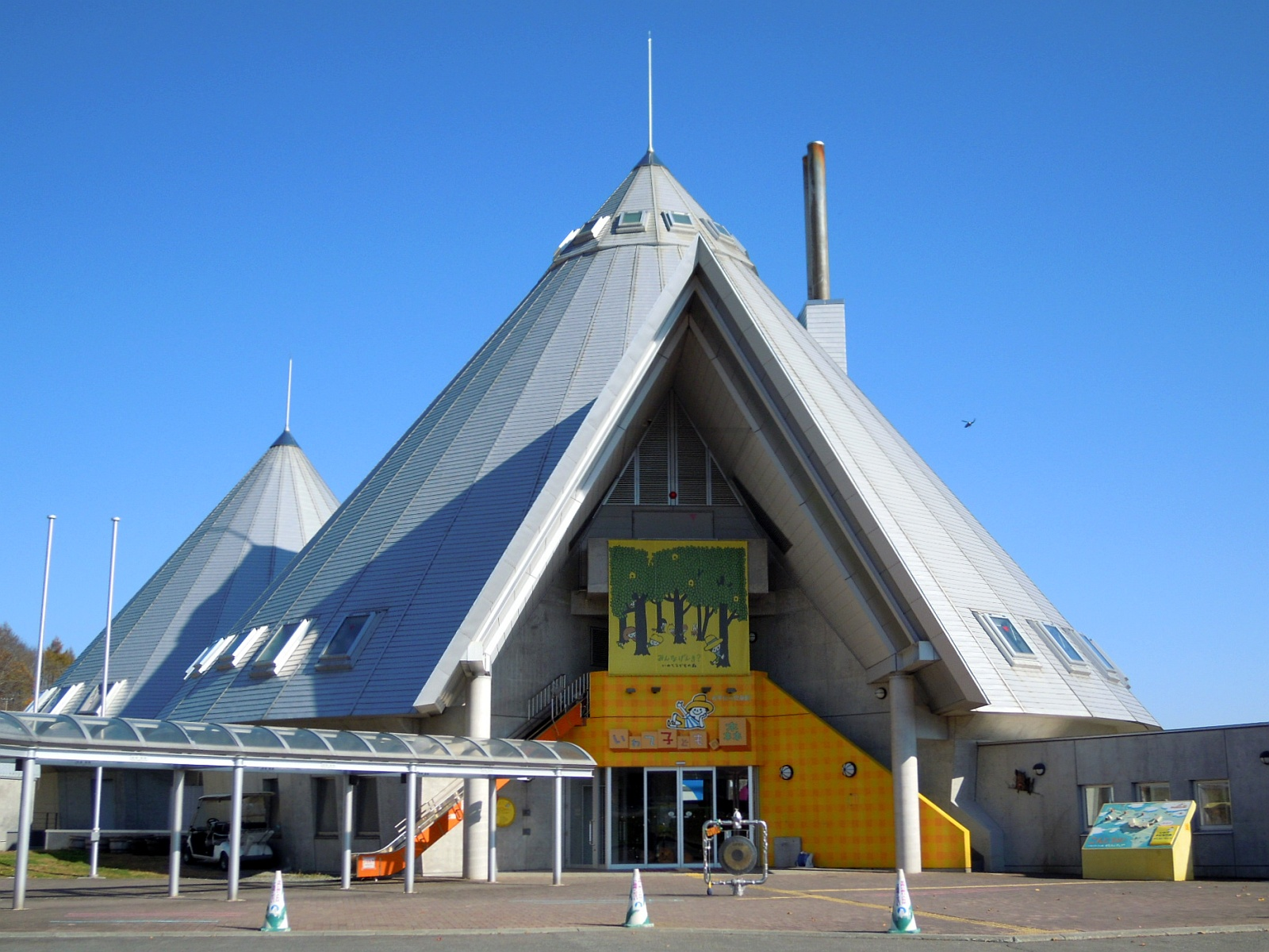 岩手県二戸郡一戸町にある岩手県立児童館「いわて子どもの森」